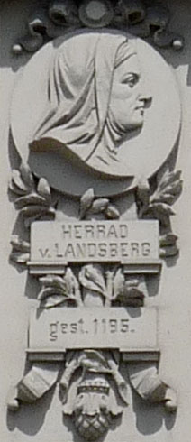 Effigie de Herrad von Landsberg (Bibliothèque nationale universitaire de Strasbourg)